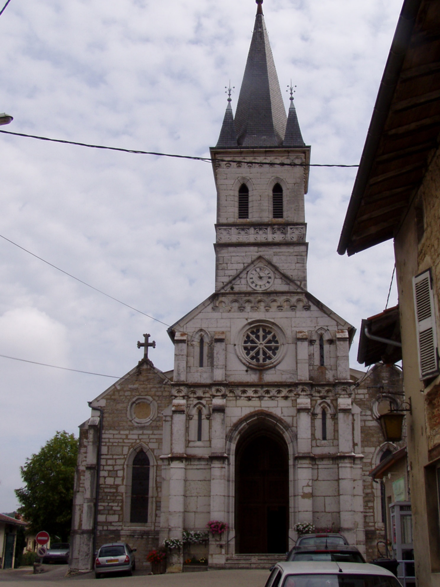 De kerk van Saint-Martin-du-Mont.